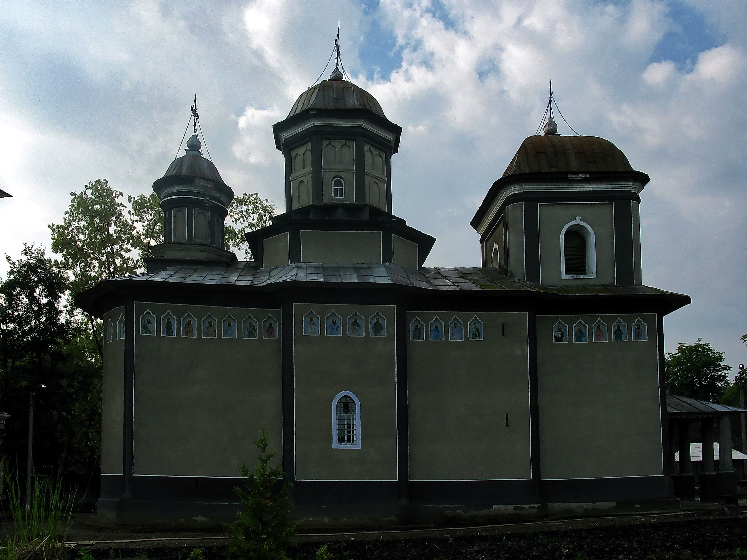 Biserica „Nașterea Maicii Domnului” din Mogoșești, raionul Herța, regiunea Cernăuți, Ucraina